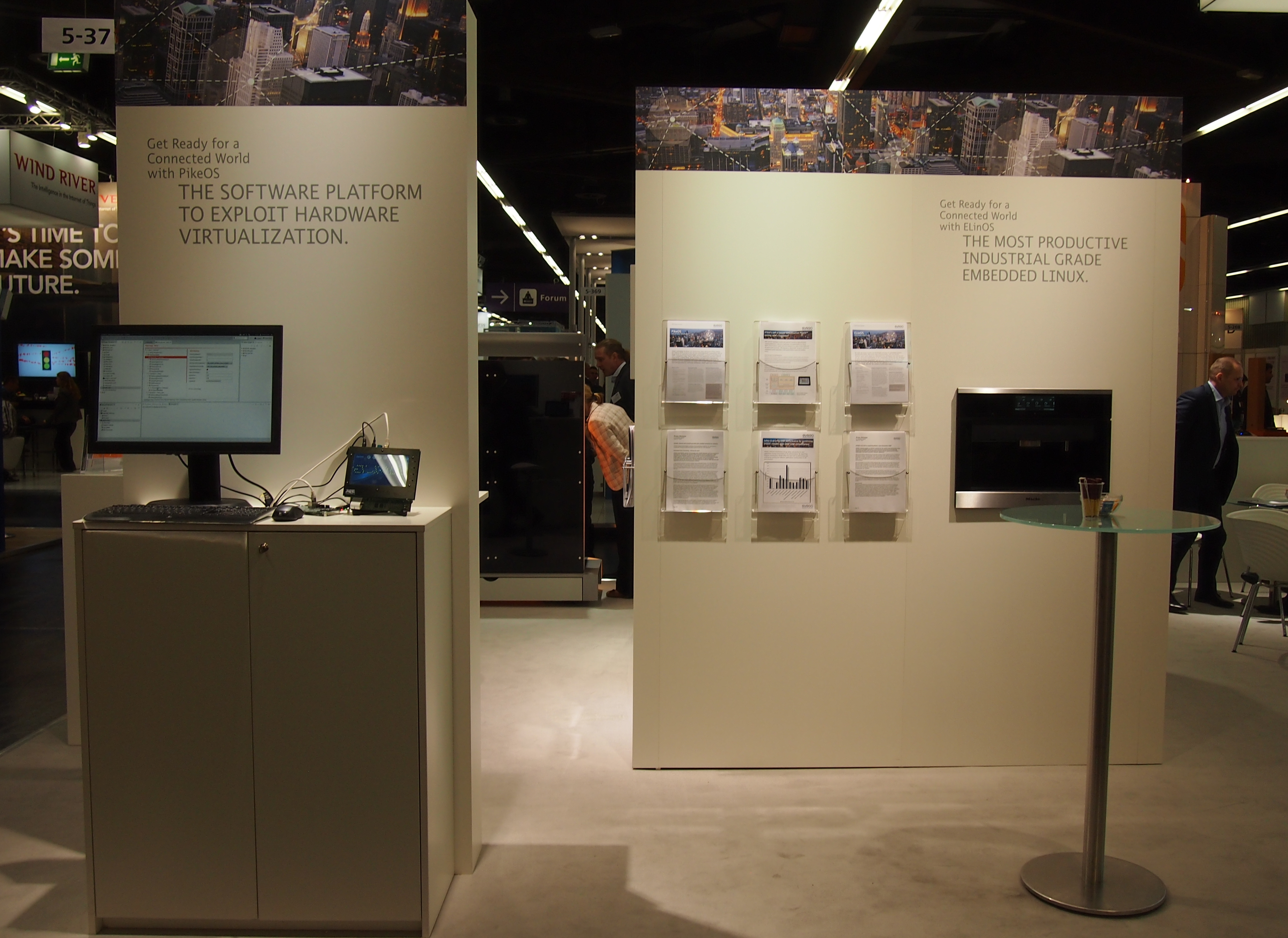 Embedded World 2014: Stand mit Embedded-Linux PikeOS und ElinOS